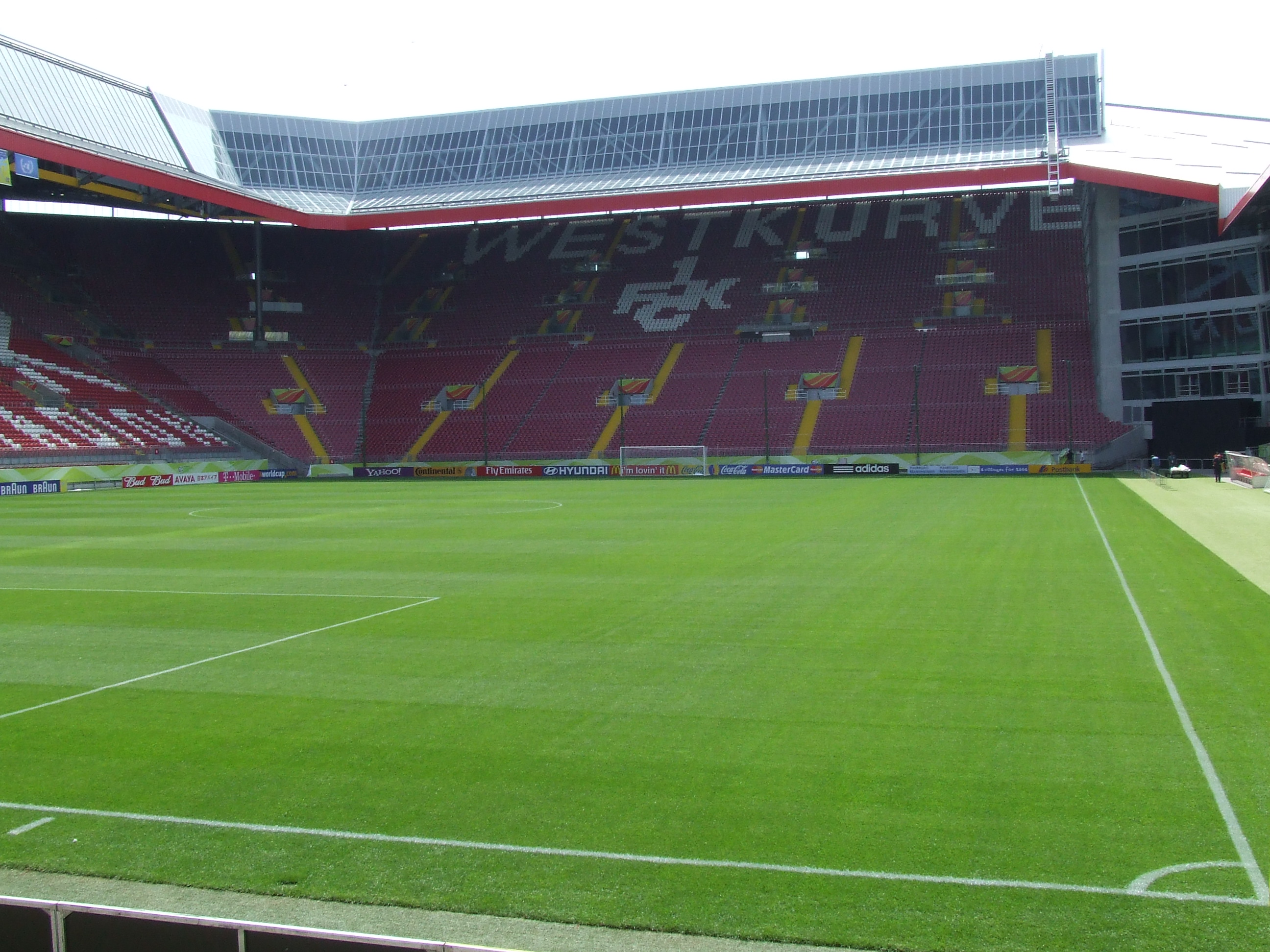 Fritz-Walter-Stadion in Kaiserslautern, vor dem FIFA WM-Spiel Australien gegen Japan, hier die berühmt berüchtigte Westkurve